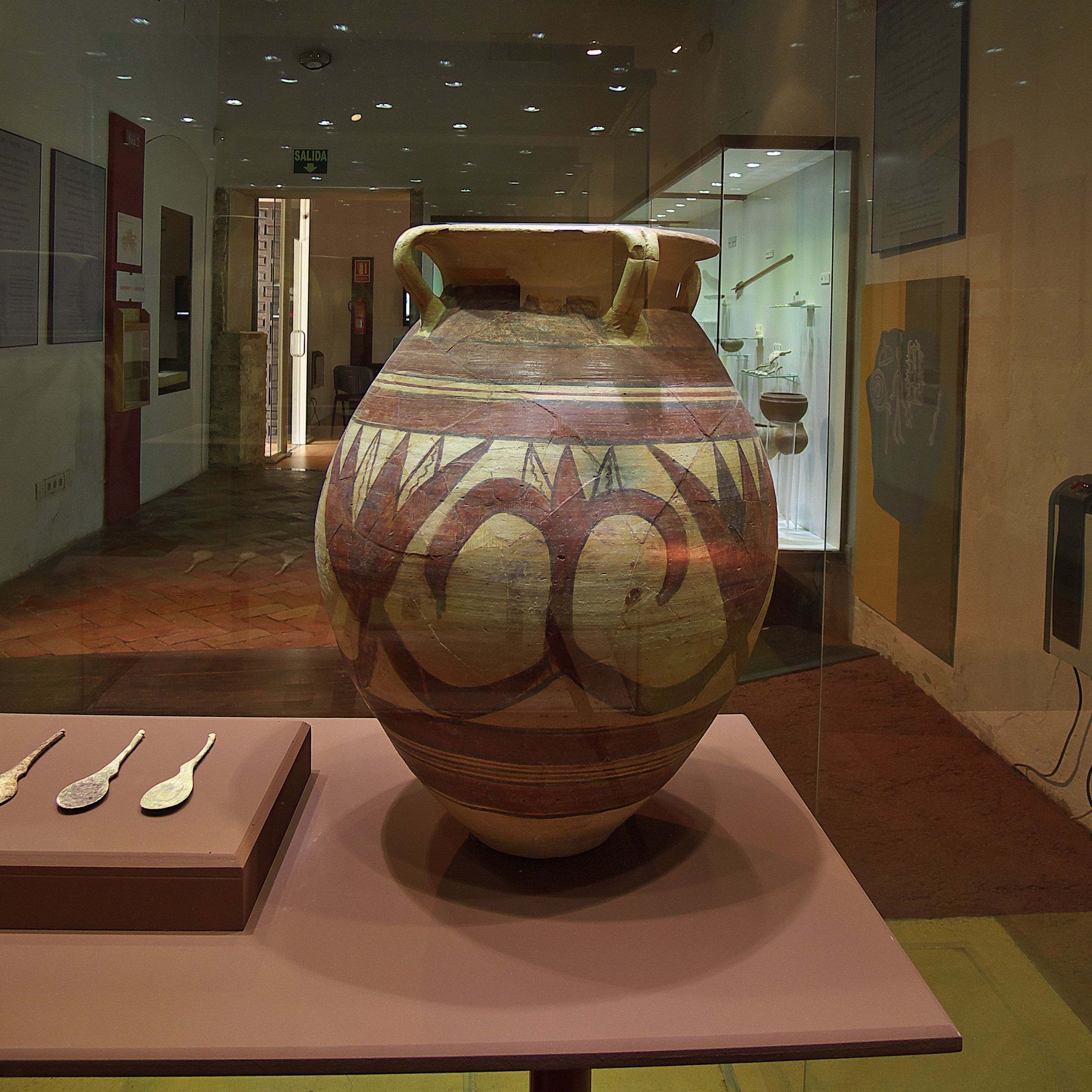 Vasija cerámica de la época tartésica (850-550 a. C.) decorada con flores de loto. Carmona